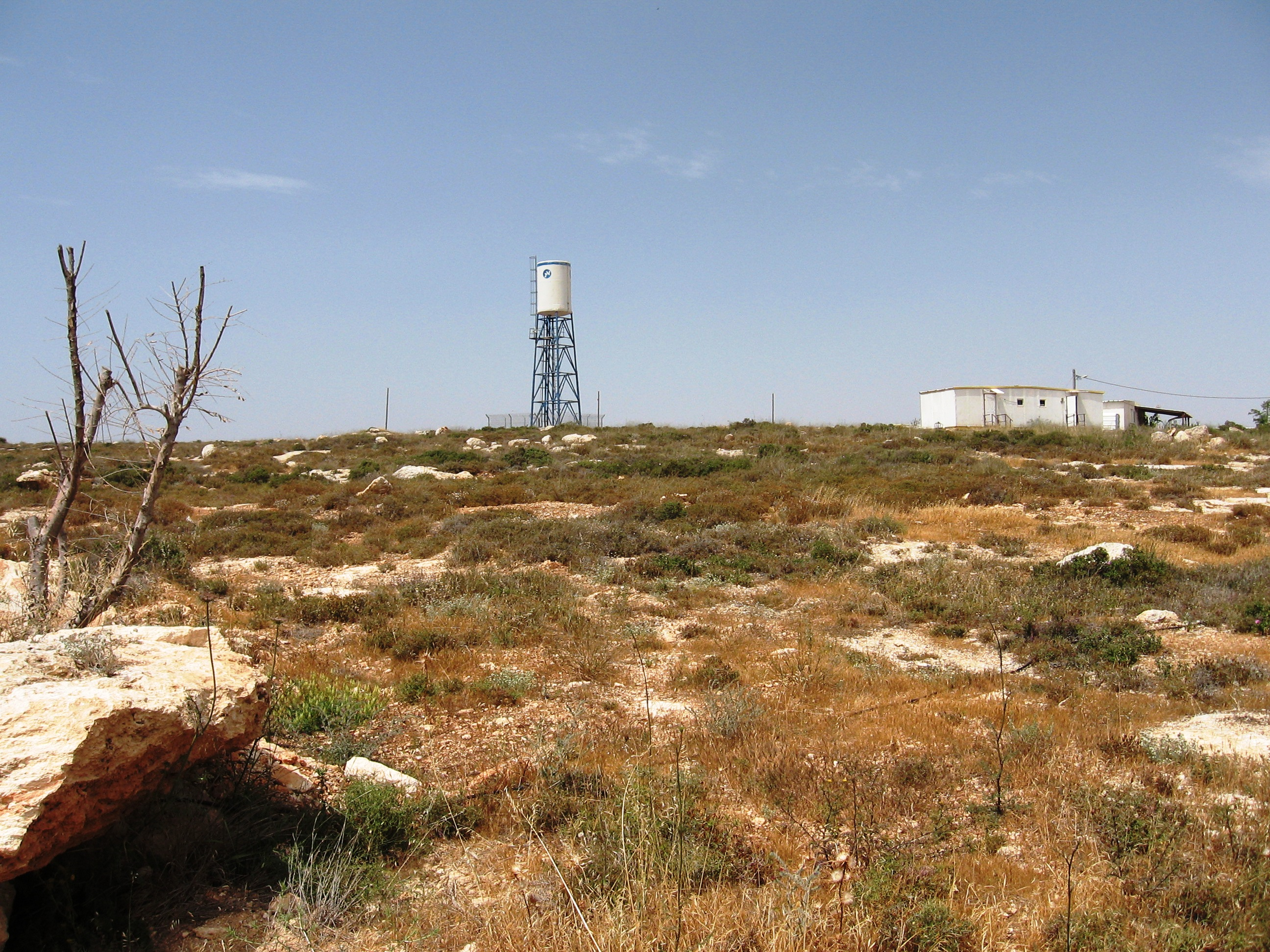 kida village Shiloh Bloc